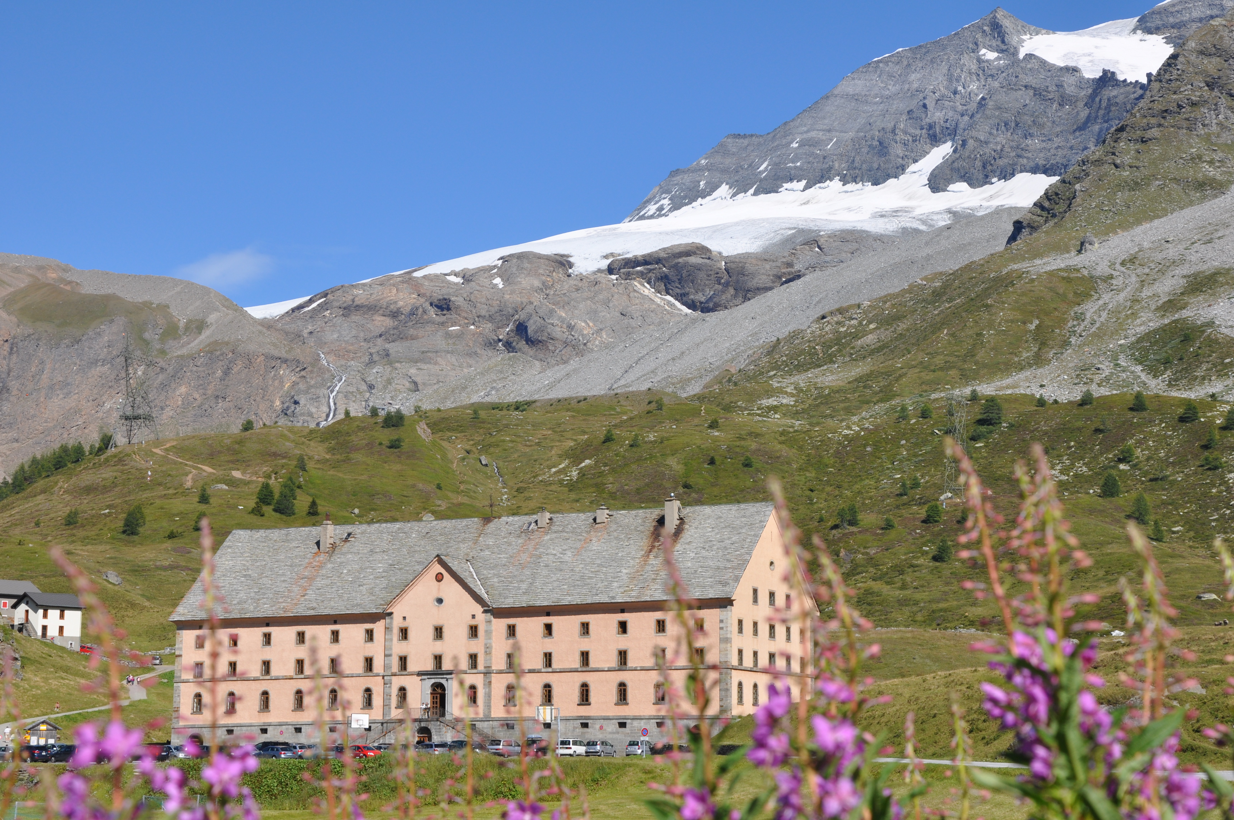 Hospice